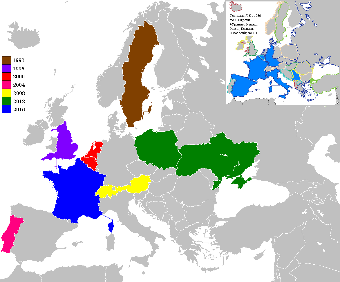 Країни, які приймали Чемпіонат Європи з футболу у різні роки.